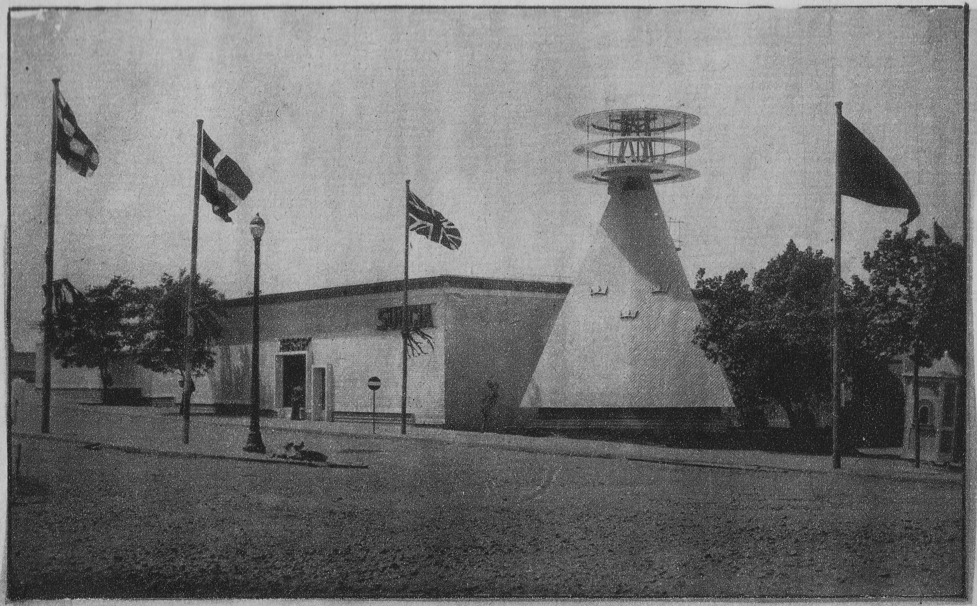 Pavelló de Suècia: obra de Peder Clason fet el 1929 per a l'Exposició Universal de Barcelona-1929 (Catalunya).